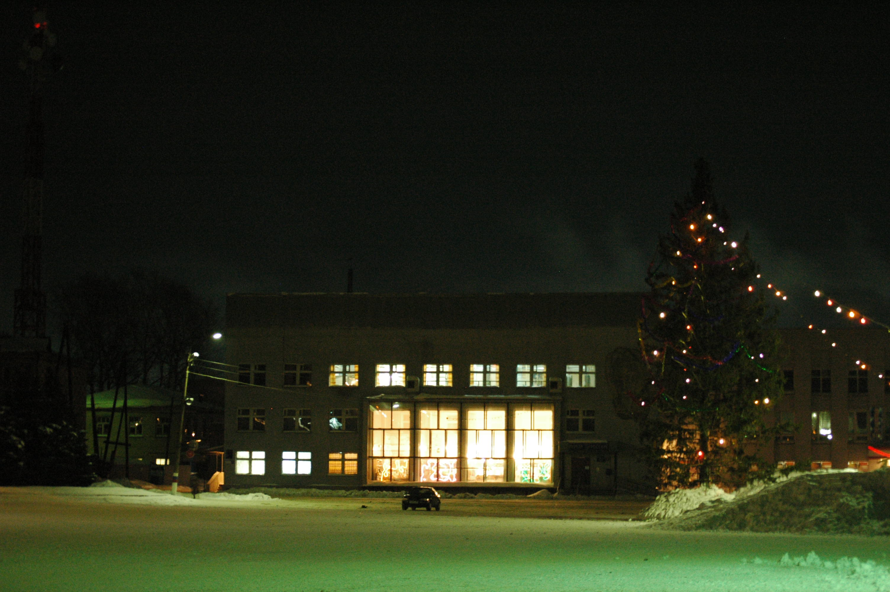 Городское почтовое отделение.